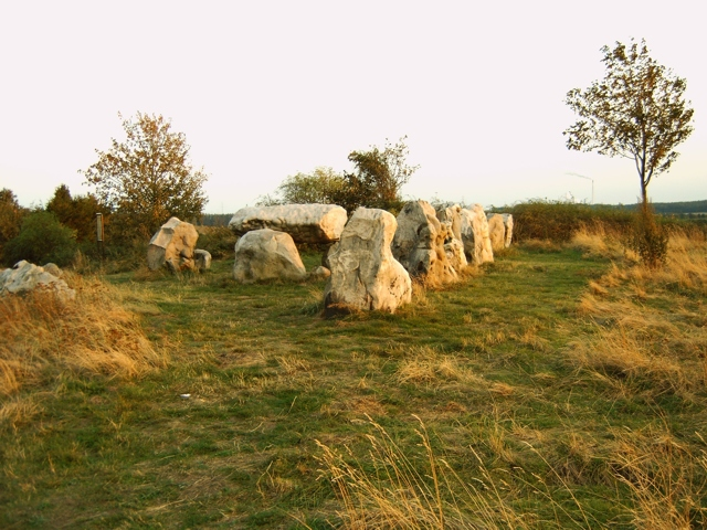 Lübbensteine Südgrab Aufnahmemodalitäten: Standort: Lübbensteine (Niedersachsen), 52.22961 N, 10.98686 O Kamera: Digitalkamera Medion MD 41066 5,18 Megapixel (2560x1920), 1-fach Zoom eingestellt (entspricht Kleinbild-Brennweite 37 mm), Blende 6.7 Belichtungszeit: 1/57 s